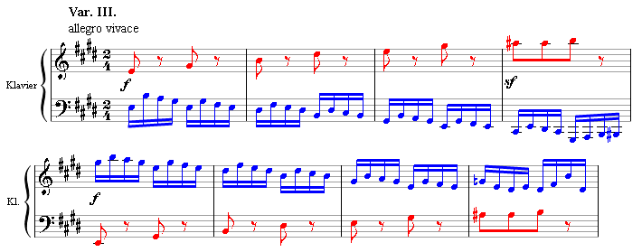 Takte 1-8 aus Variation III des dritten Satzes von Beethovens Klaviersonate Opus 109